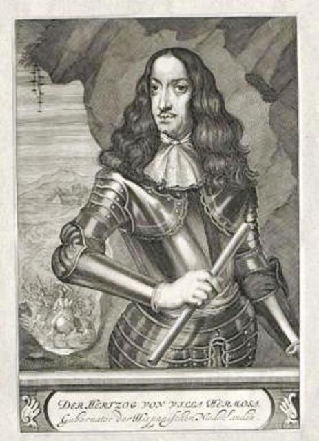 Retrato de Carlos Aragón de Gurrea y Borja, IX Duque de Villahermosa.